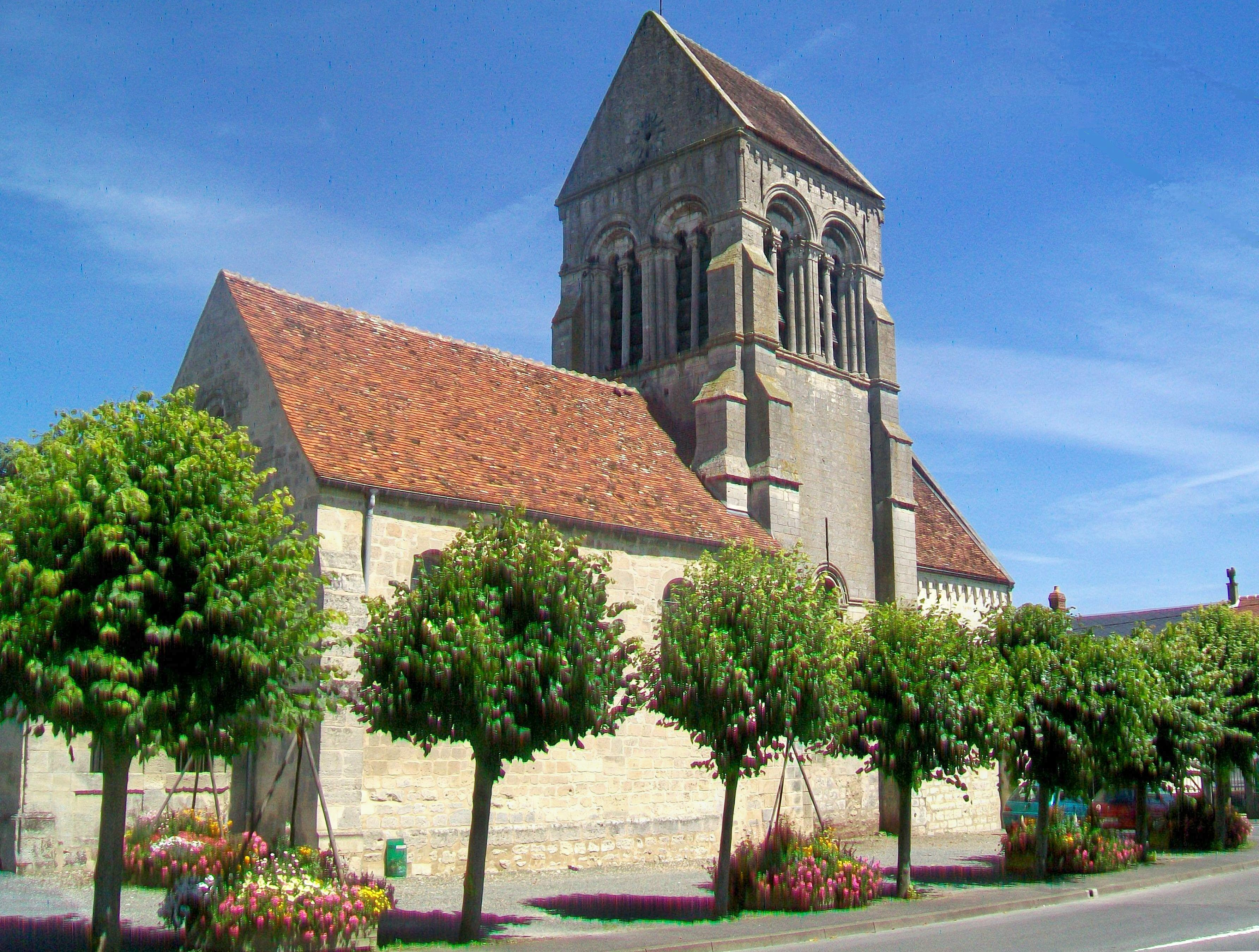 Vue d'ensemble de l'église depuis le sud-ouest.